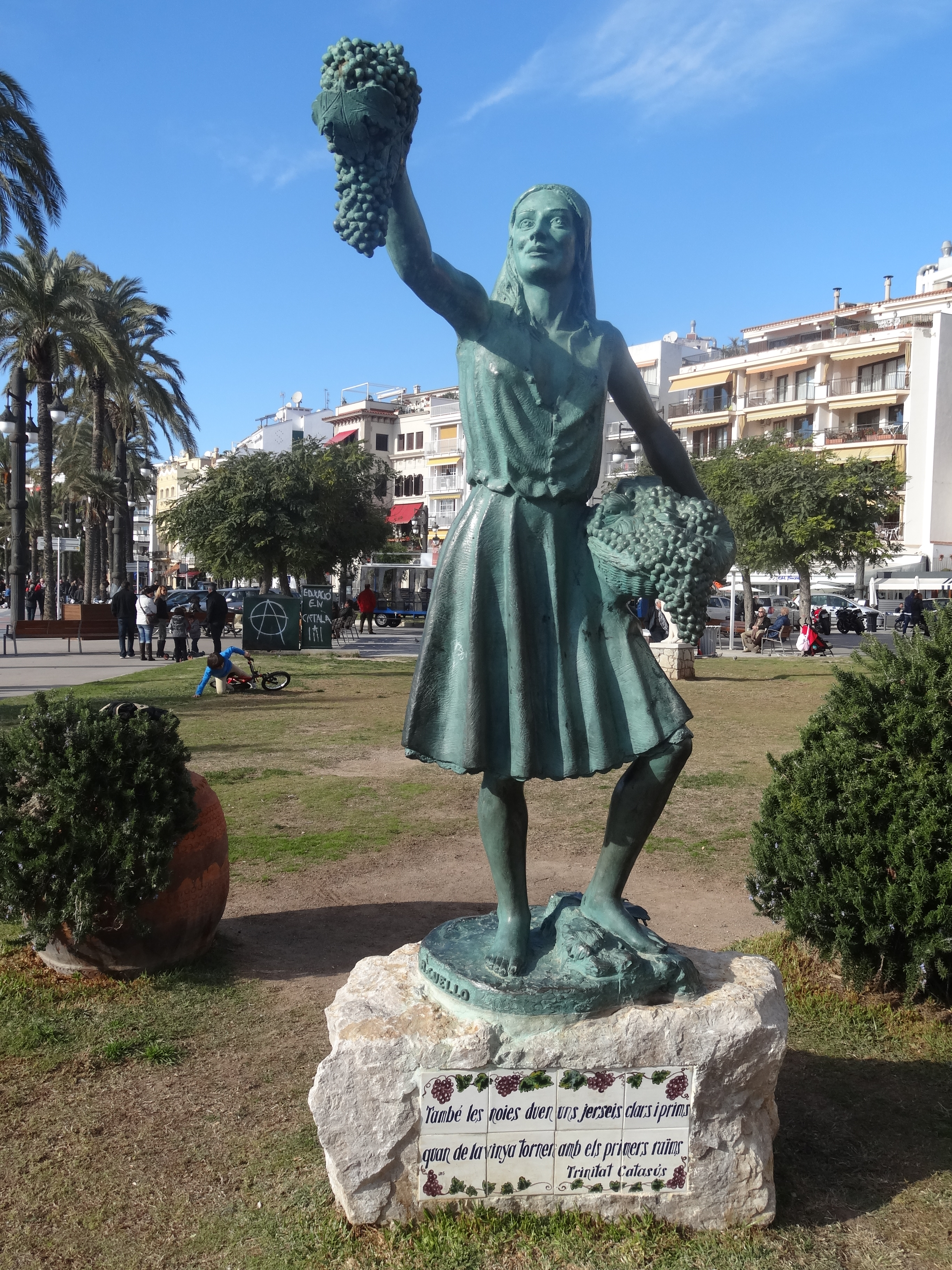 Escultura 'La noia de la malvasia' als jardins de la Fragata (Sitges). Obra de 2005 de l'artista Ramon Cuello, inaugurada el 2006. Al peu de l'escultura hi figura la inscripció del poeta Trinitat Catasús que diu "També les noies duen uns jerseis clars i prims quan la vinya tornen amb els primers vins". L'obra recorda als sitgetans que van treballar en la collita de la malvasia. L'imatge d'una noia alegre transmet els valors del treball i de la llibertat. L'obra fou treballada durant més de vuit mesos amb la tècnica anomenada "cera perduda" i té un pes total de 200 quilos i el bronze com a material principal.